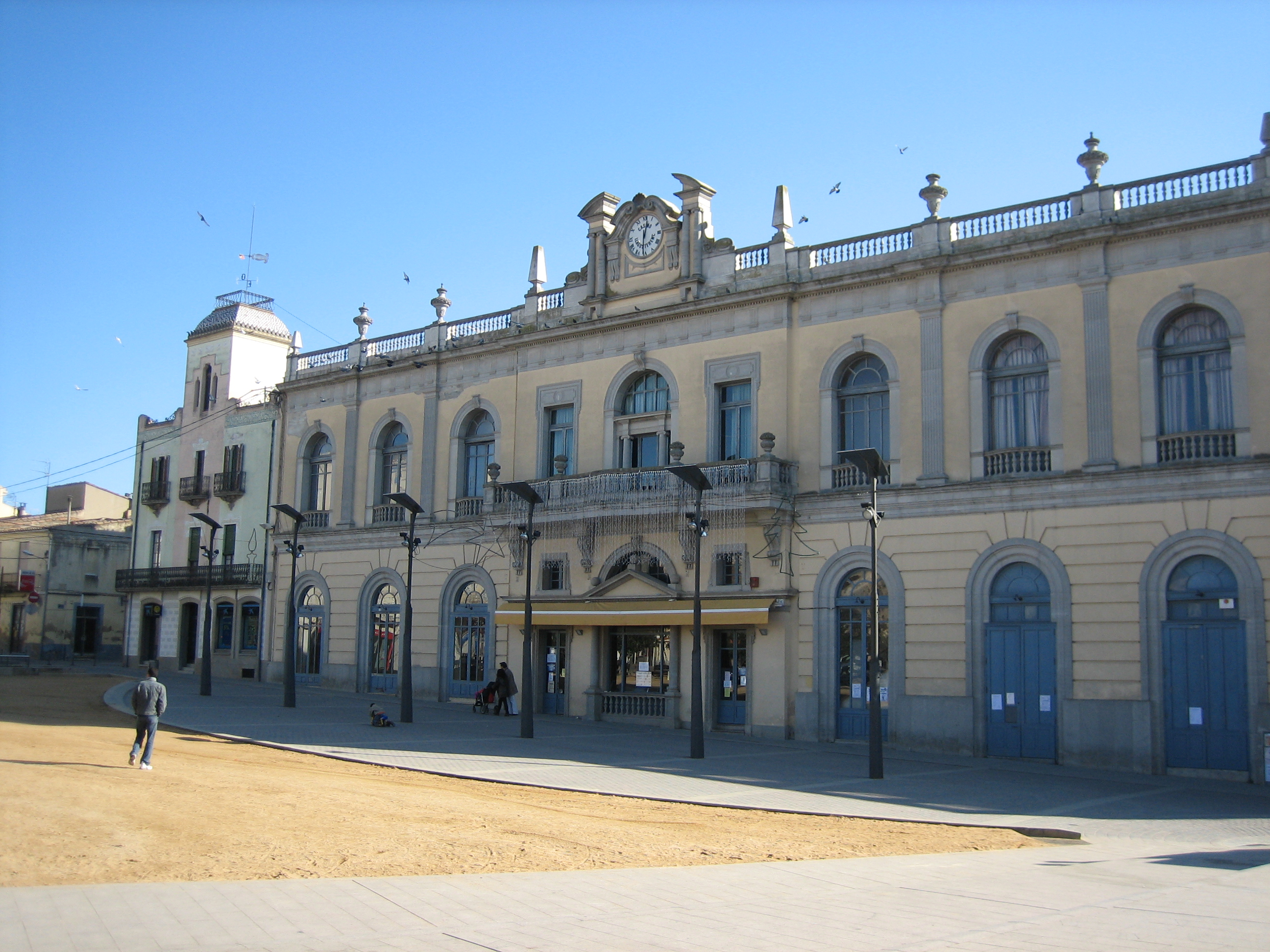 Casino de Llagostera (1928). Arquitecte: Josep Esteve